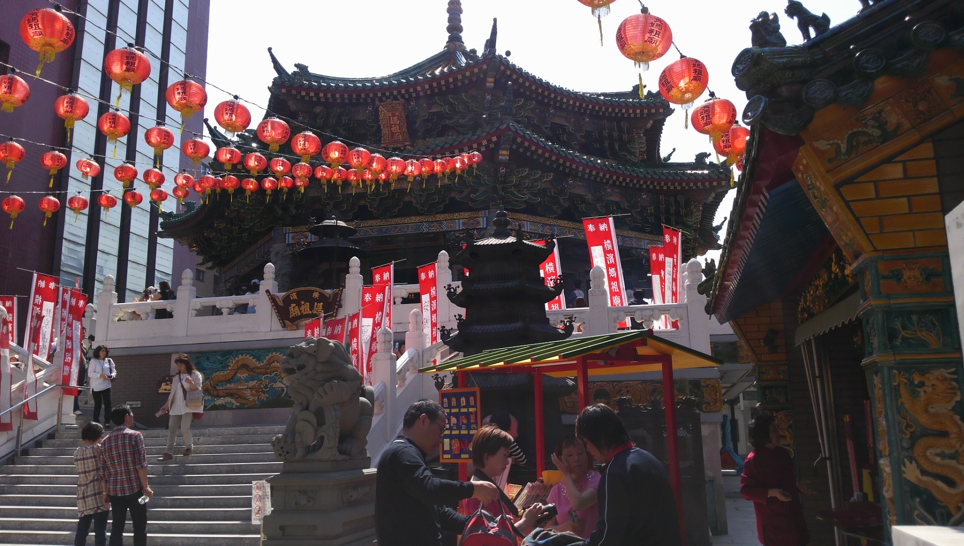 神奈川県横浜市の横浜中華街にある、横浜媽祖廟。